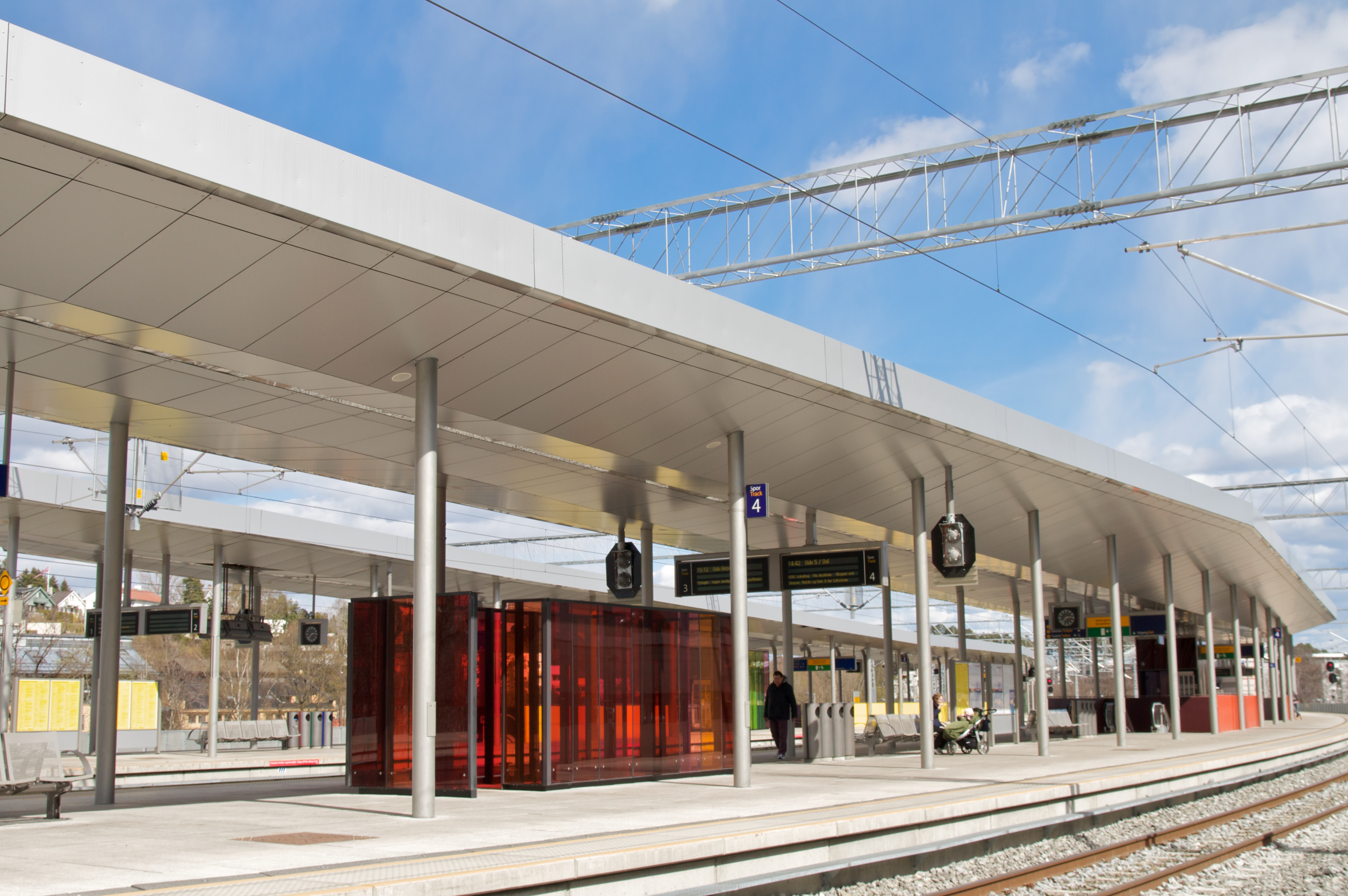 Lysaker stasjon i Bærum.